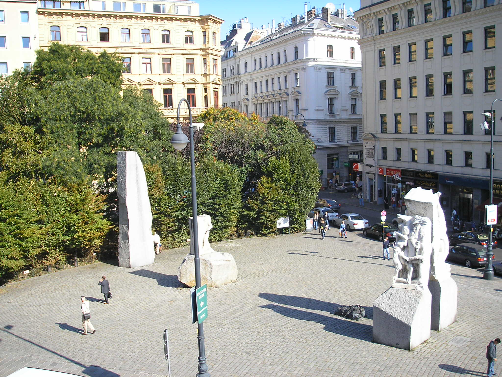 Mahnmal gegen Krieg und Faschismus (Monument against War and Fascism) in Vienna, Austria. Constructed by Alfred Hrdlicka.